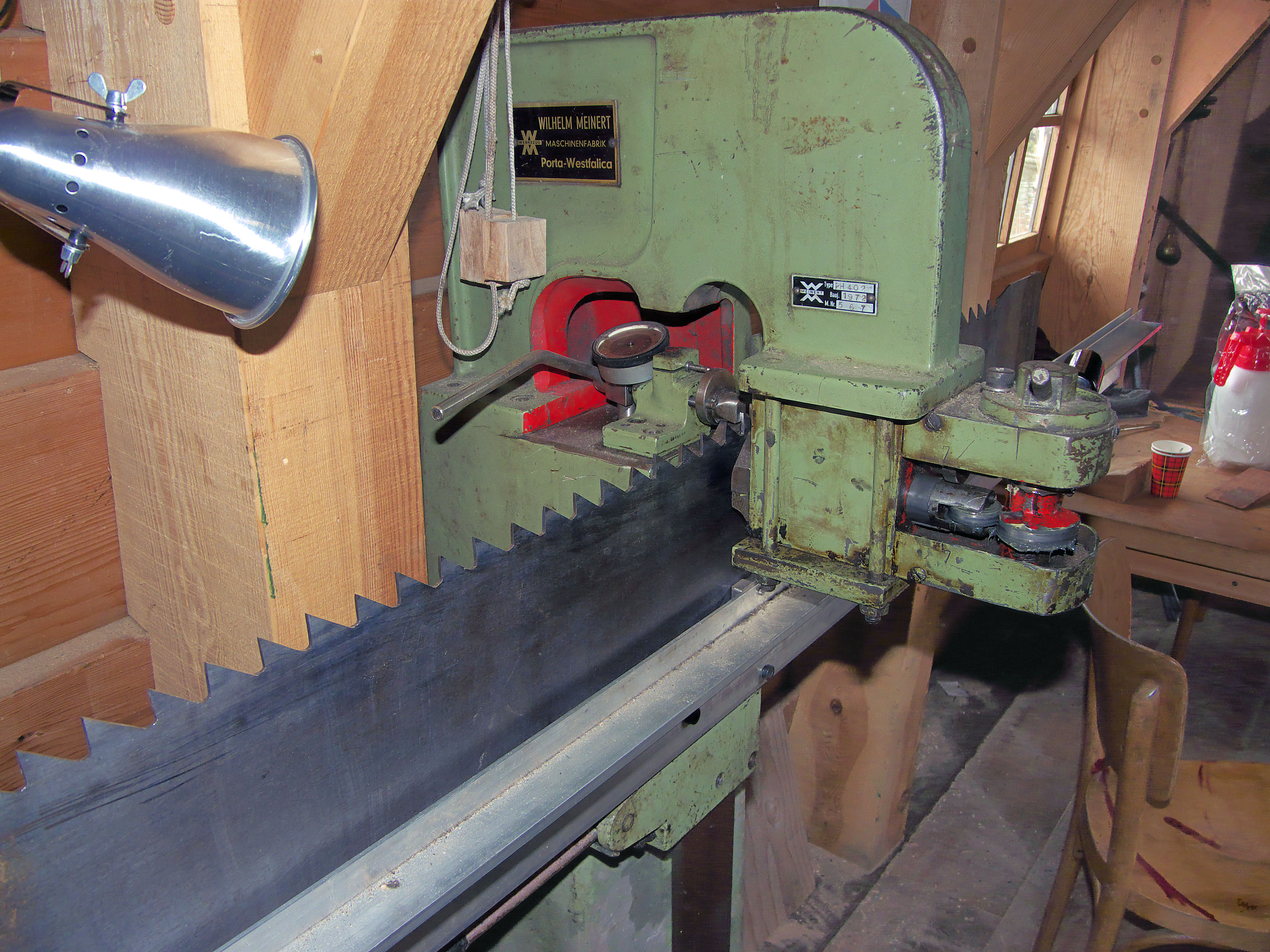 Molen Het Jonge Schaap, zaagzetmachine